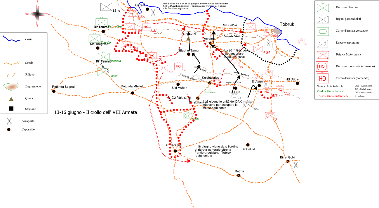 Eventi della battaglia di Ain el Gazala dal 13 al 16 giugno 1942